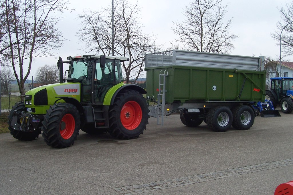 Claas Ares 696 RZ mit Tandem-Anhänger von Fliegl